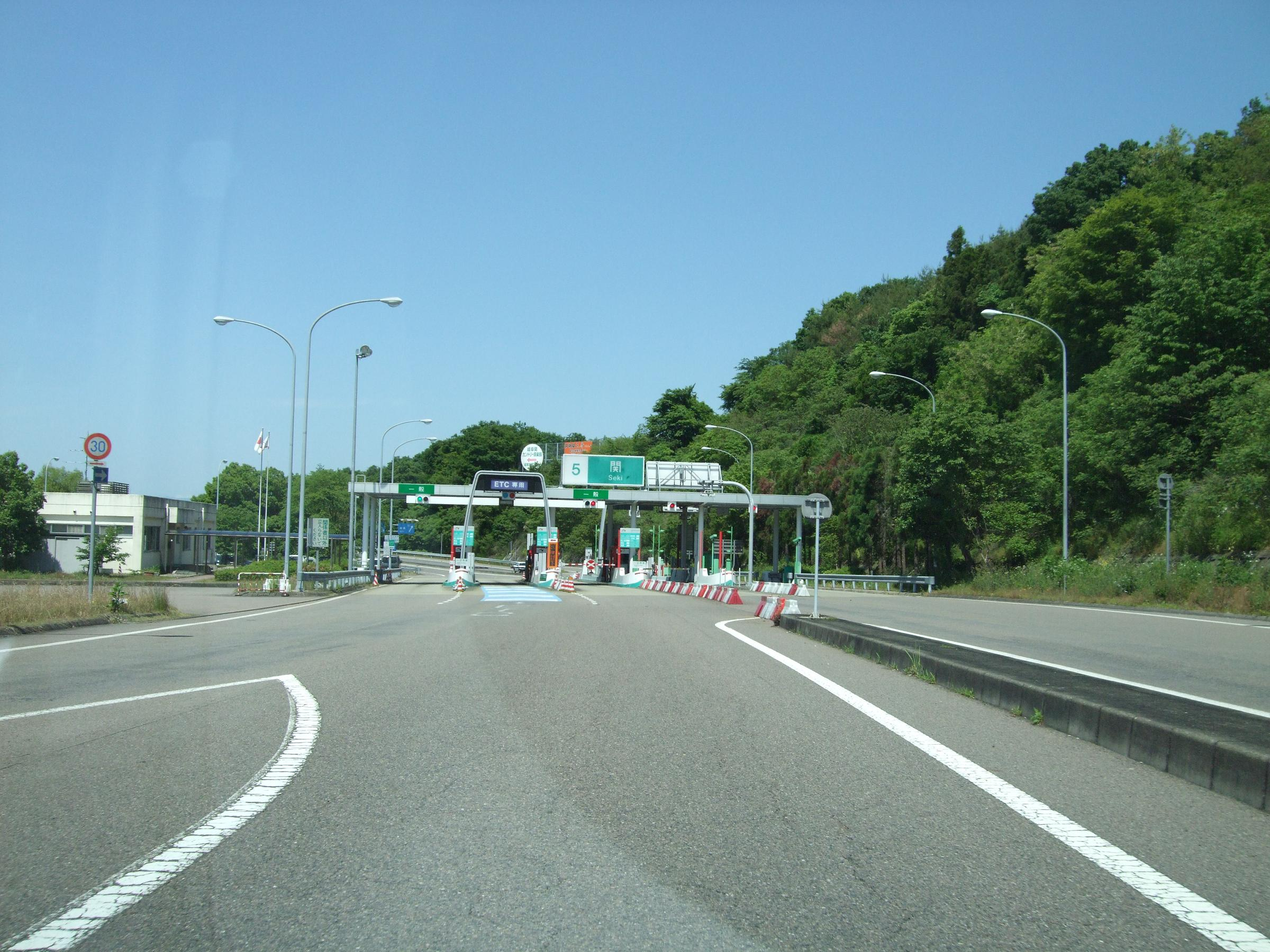 東海北陸自動車道 関インターチェンジ 料金所出口